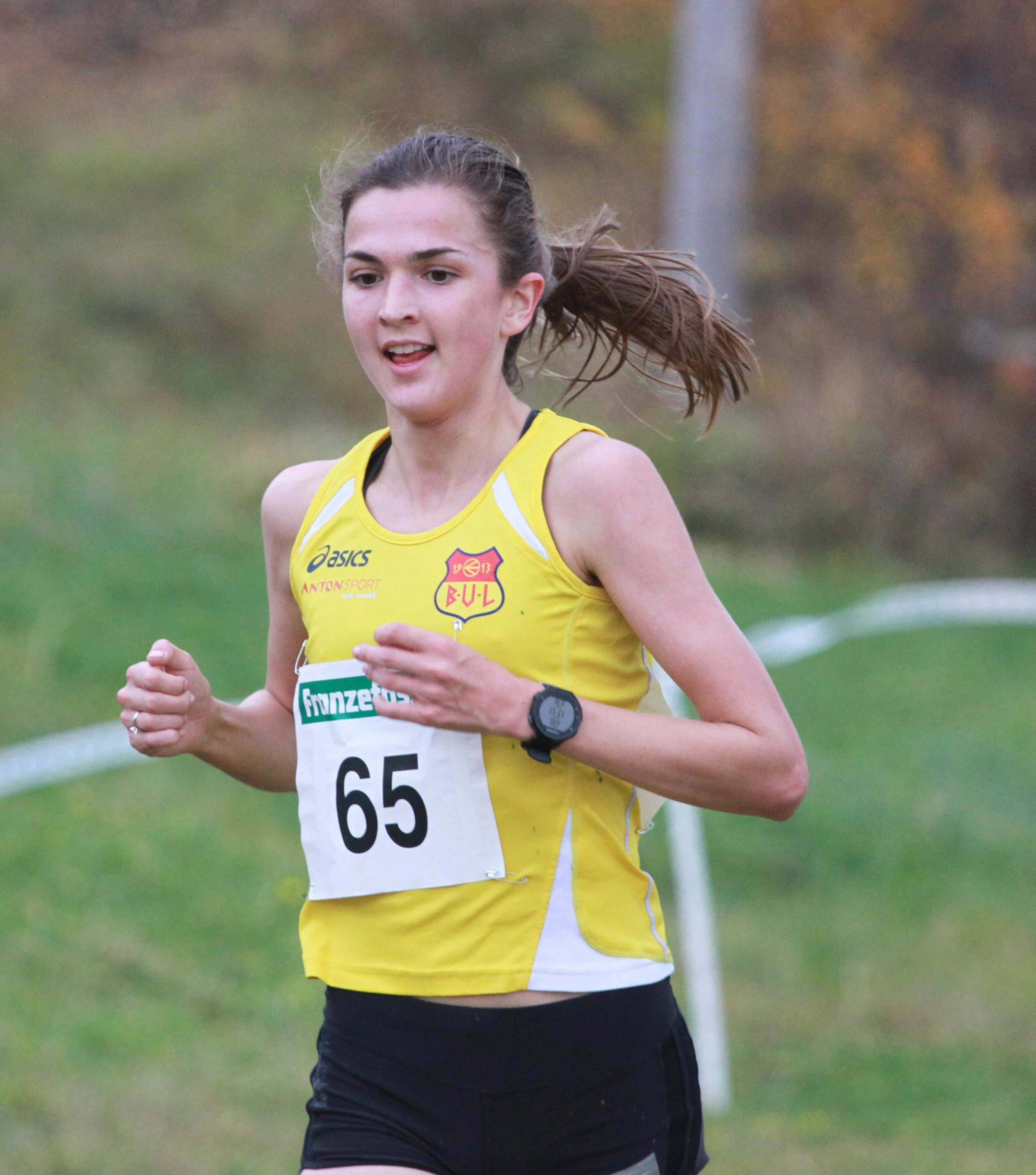 Sigrid Jervell Våg under NM i terrengløp i 2018.